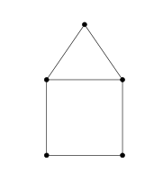 Grafo hamiltoniano semejante a una casa(Parte1)